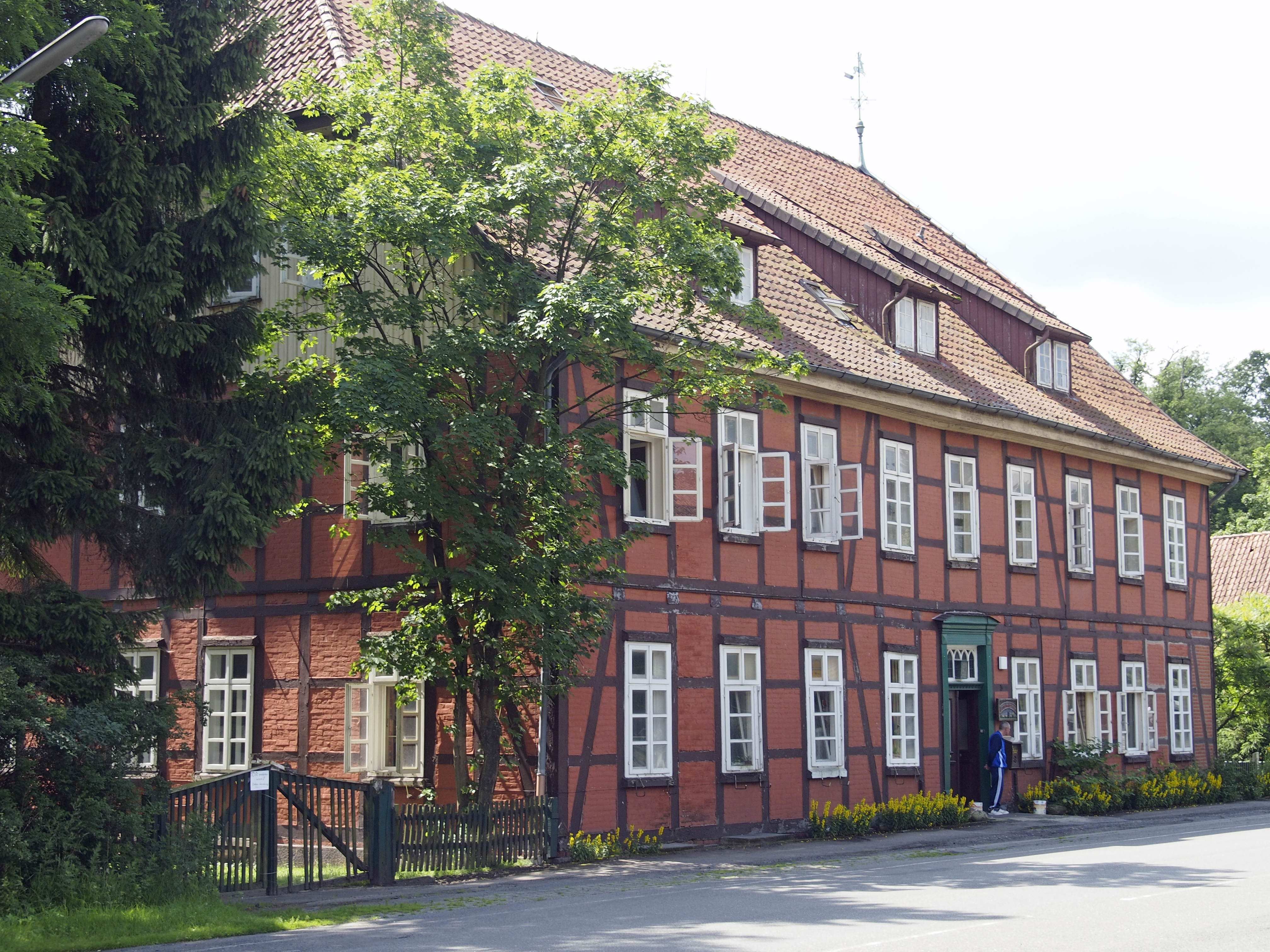 Haupthaus des ehemaligen Grauen-Hofes in Eschede-Weyhausen (Germany) (von 1840), heute ein Pflegeheim für Suchtkranke